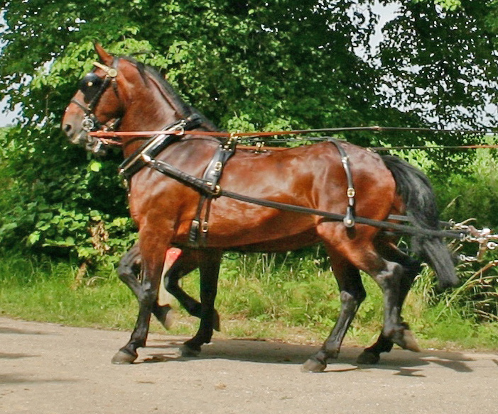 Cleveland Bay Gespan